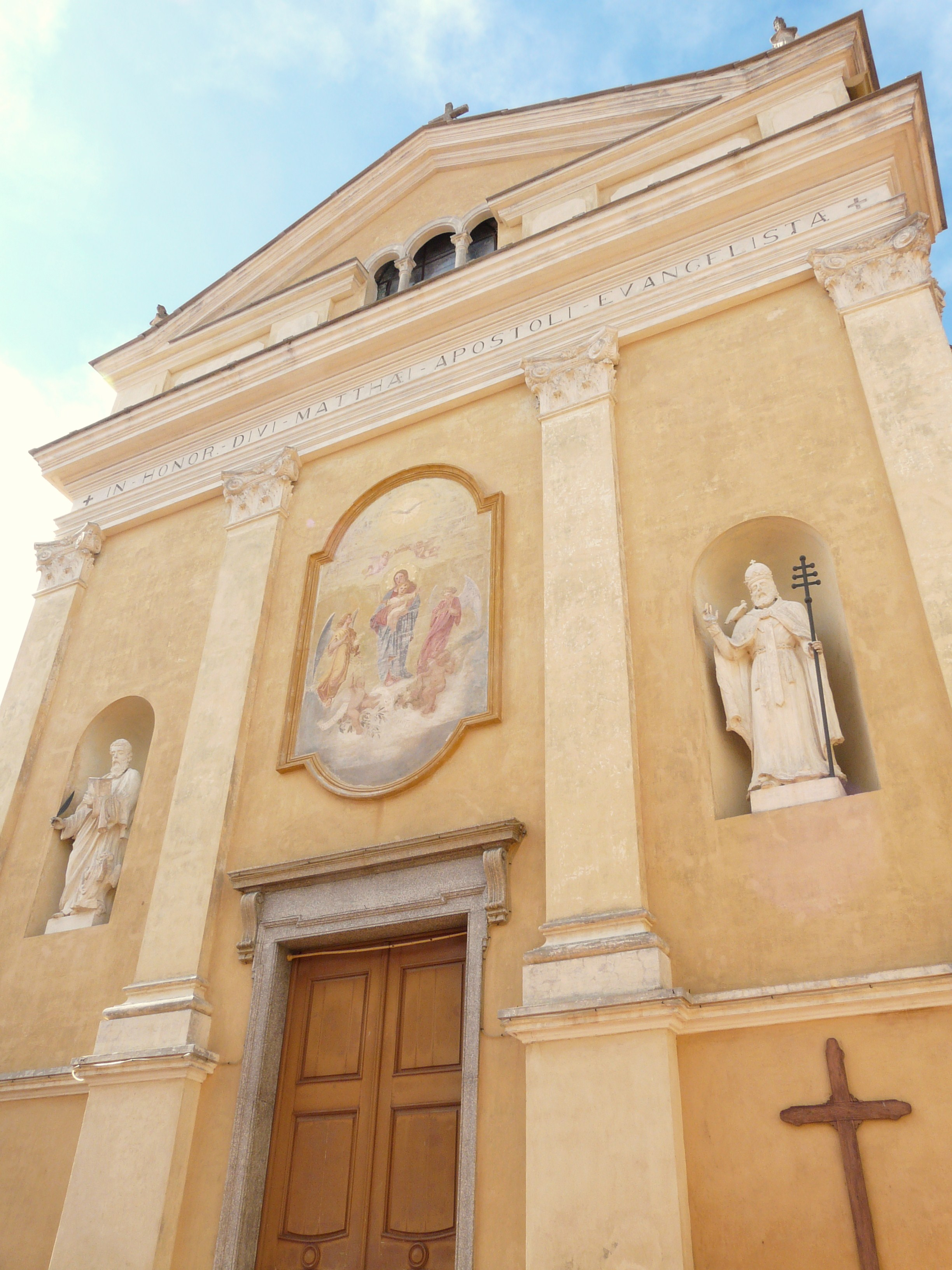 Chiesa di San Matteo, Pietrabruna, Liguria, Italia